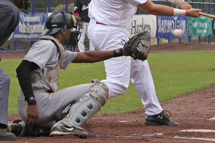 Jonny Balentina in de wedstrijd Kinheim-Neptunus op 27 mei 2007.